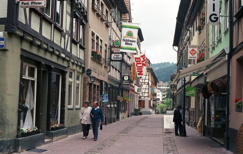 Juni 1988 Eberbach